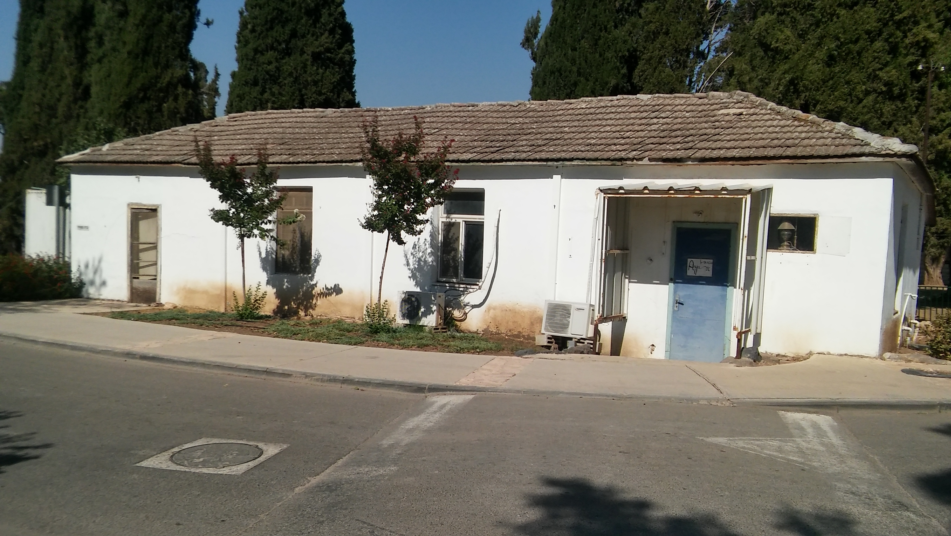 איילת השחר - מבני הפרסה - בית 9